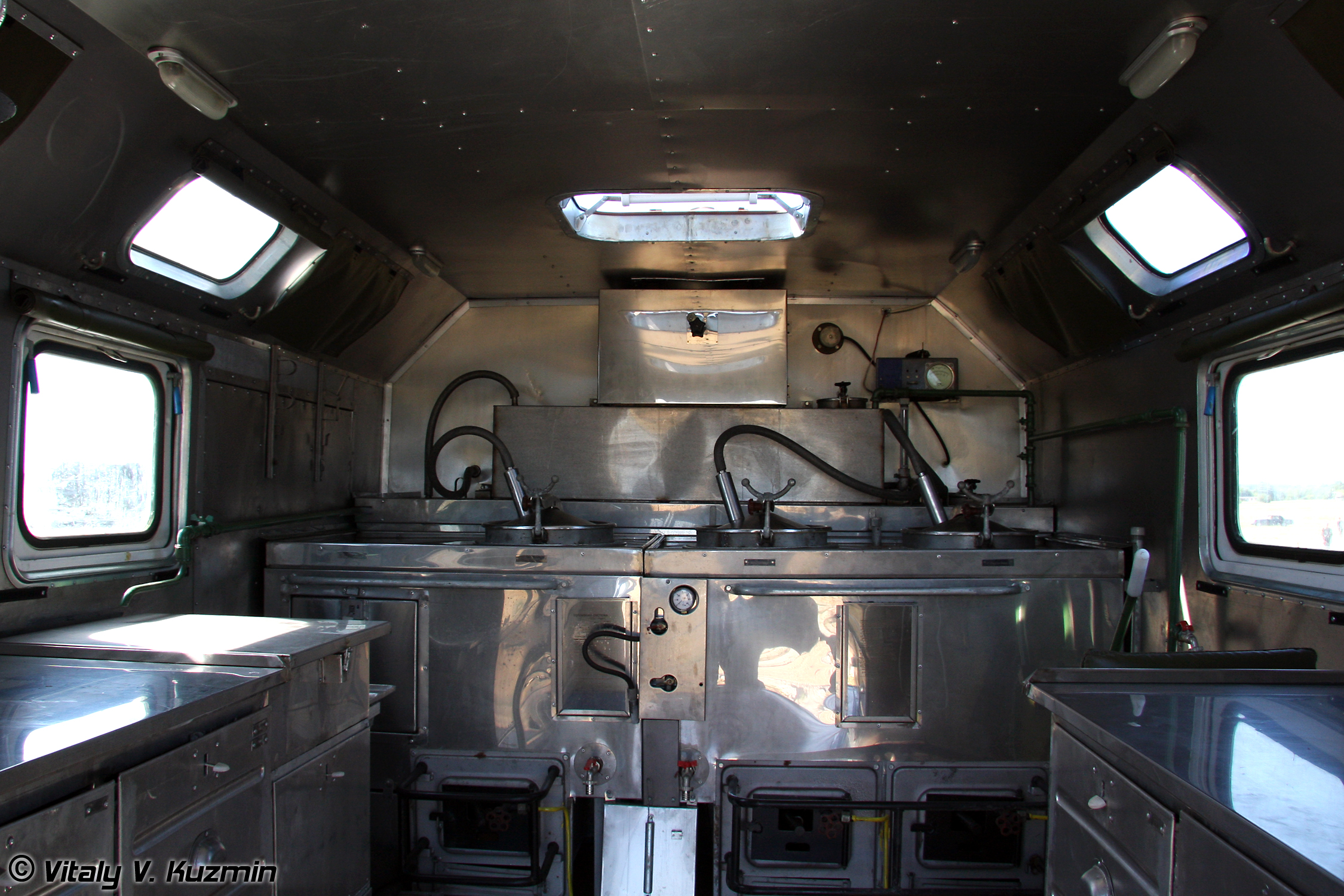 Самая важная и незаменимая техника - кухня автомобильная ПАК-200М (The most important vehicle - field kitchen PAK-200M)